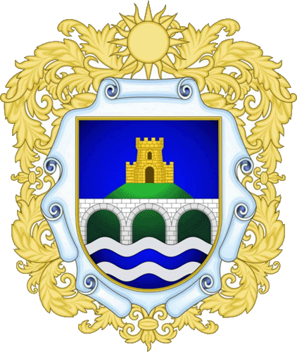 Герб Жванецької ОТГ